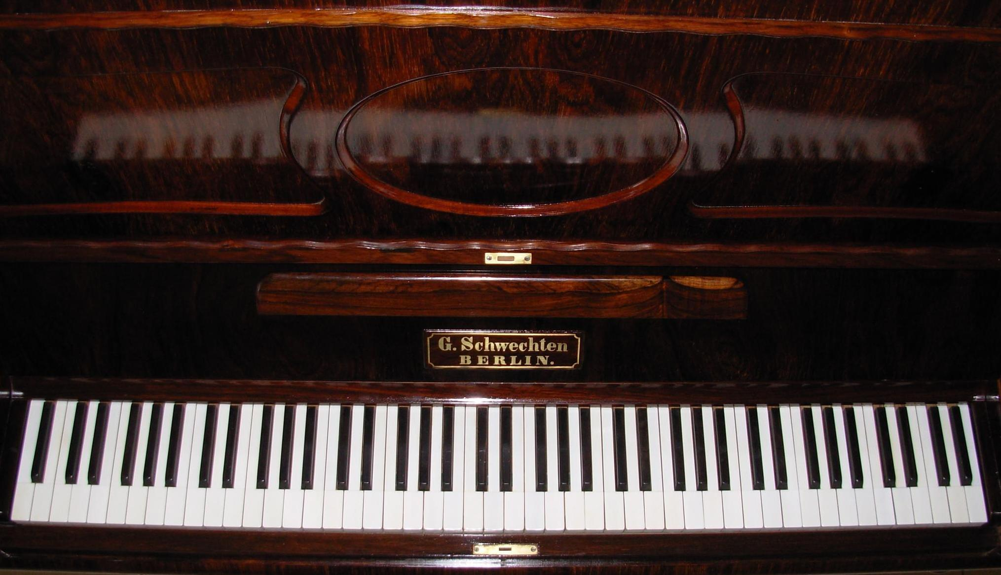 Placa del fabricante y teclado de piano G. Schwechten